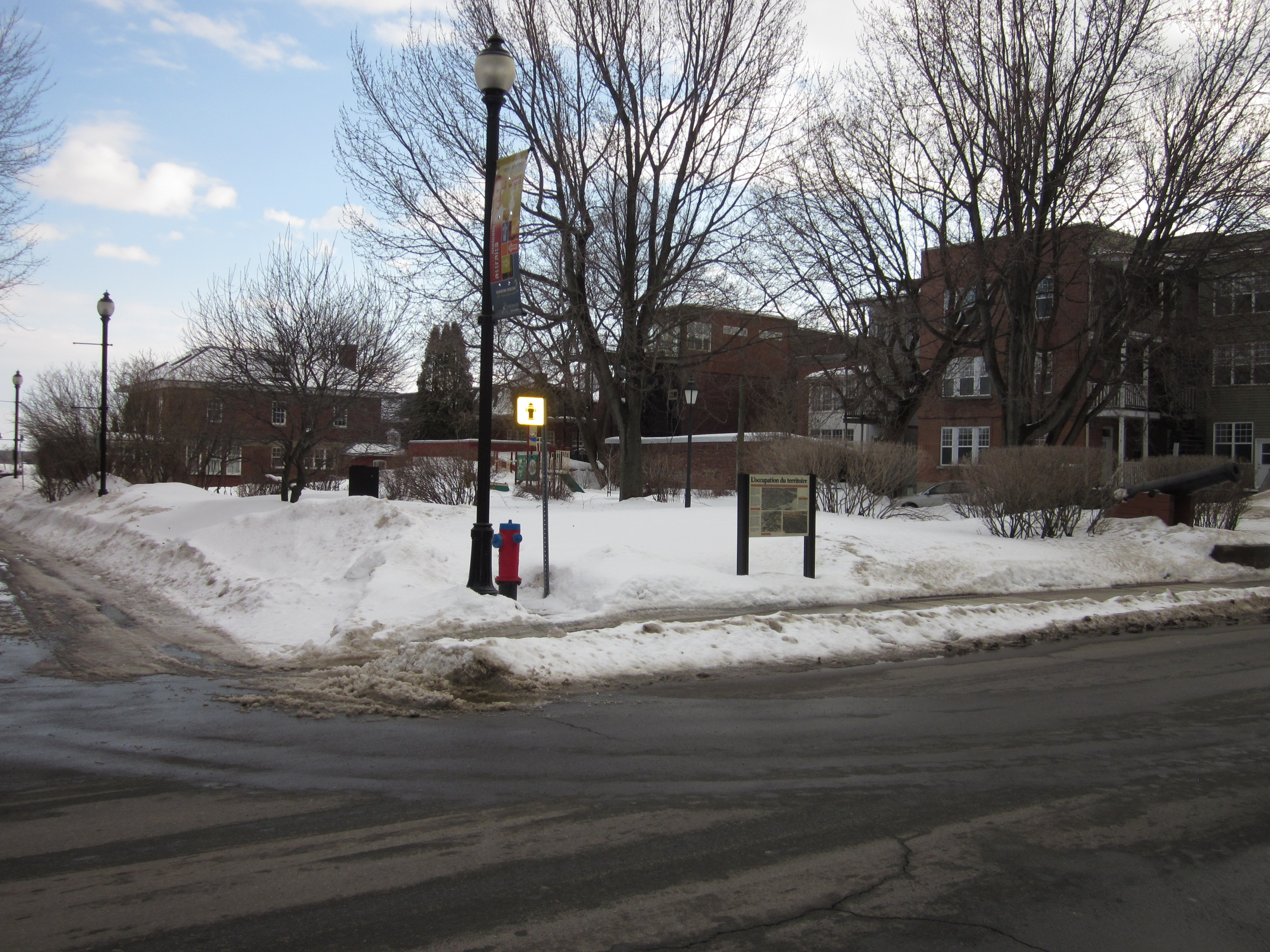 La place d'Armes à Trois-Rivières, sur la rue des Ursulines